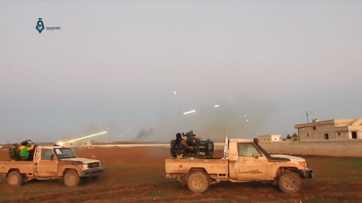 Rebelles syriens de Jaych al-Nasr (ASL) dans la région d'Idleb, le 23 janvier 2018.